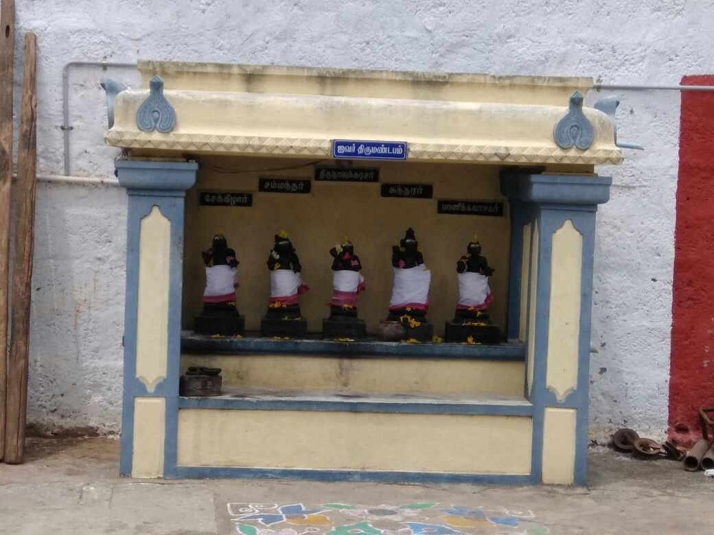 கோயிலின் அய்வர் சன்னதி